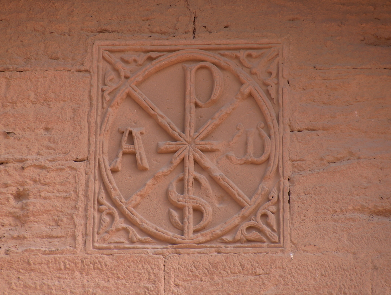 Sé Velha de Lérida. Sé Velha de Lérida em Espanha.